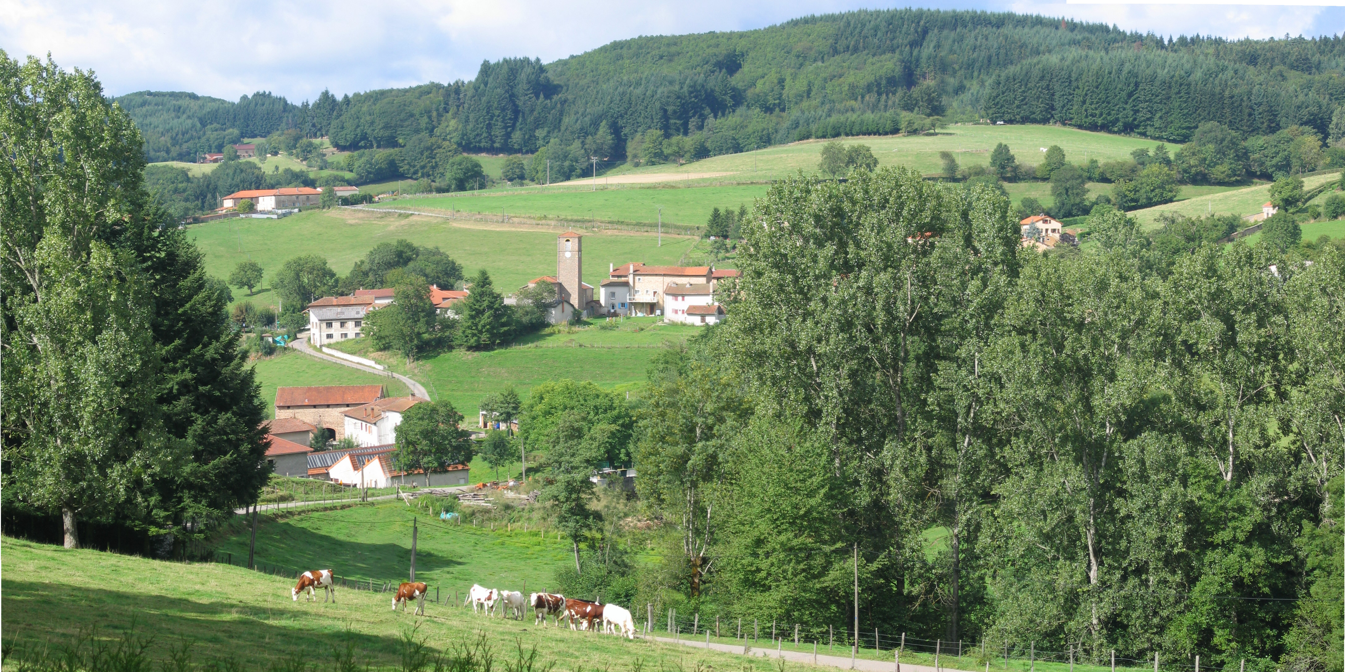 vue panoramique de la chapelle